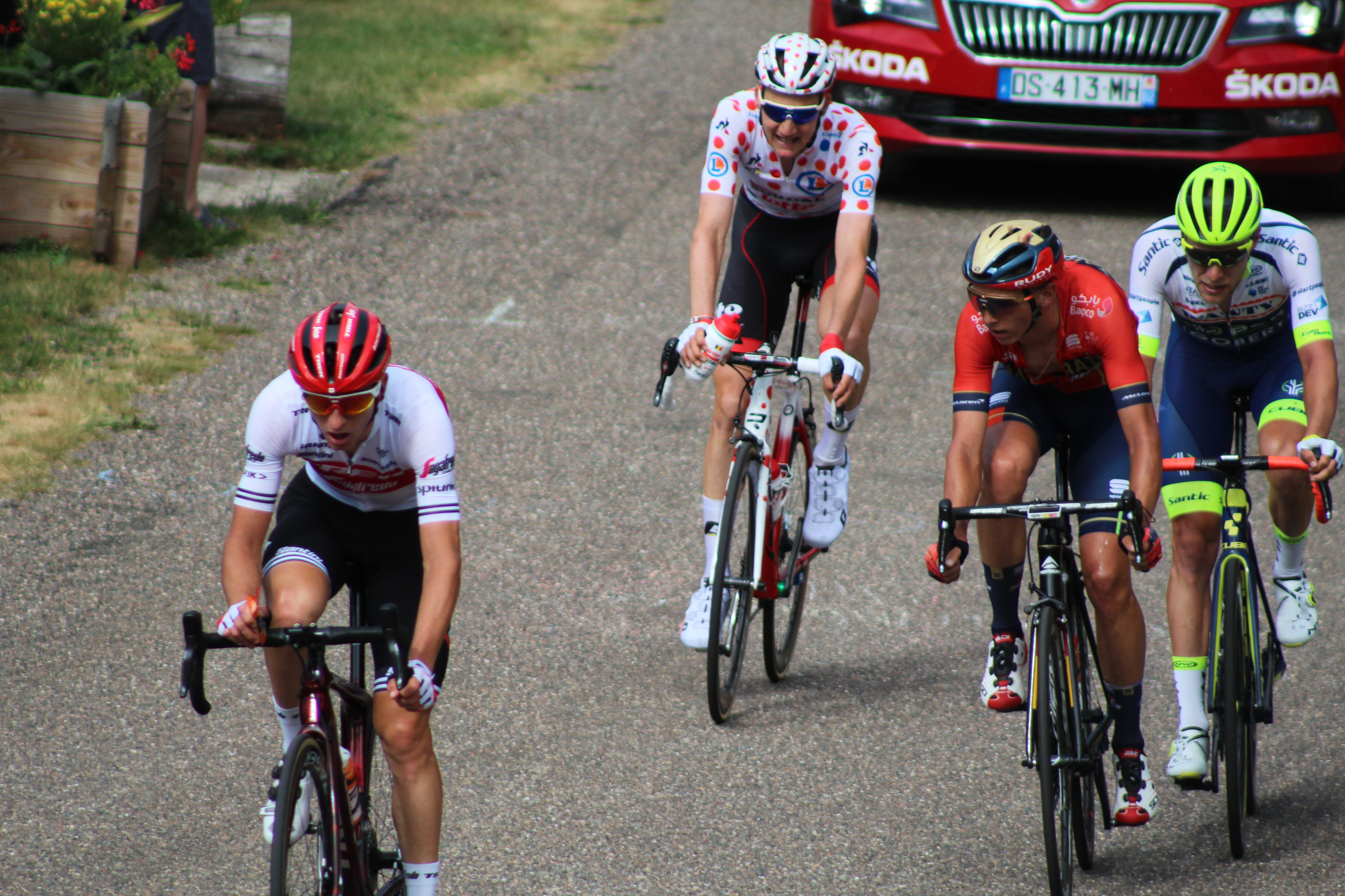 Passage de l'échappée de 4 coureurs (Tim Wellens, Xandro Meurisse, Dylan Teuns et Giulio Ciccone) à Belfahy dans la 6e étape du Tour de France 2019.